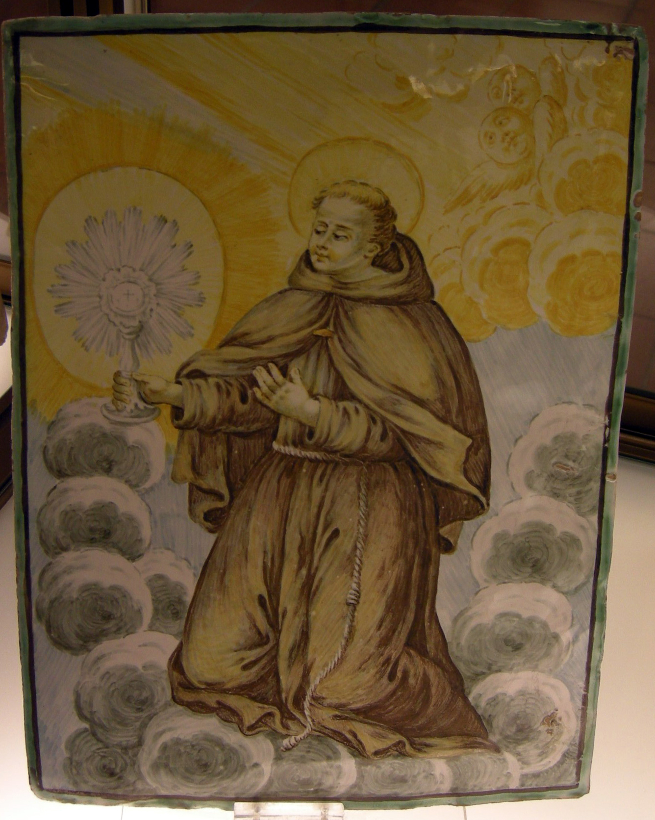 Palazzo Ducale di Urbino - Galleria Nazionale delle Marche - MIBAC This is a photo of a monument which is part of cultural heritage of Italy.